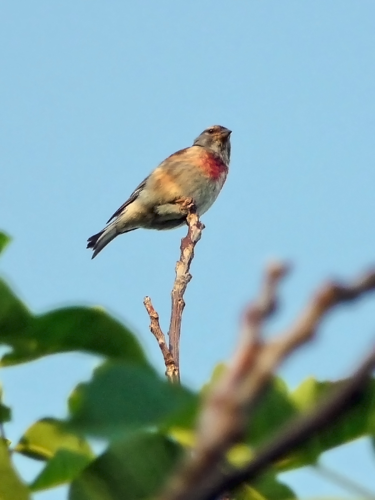 Carduelis_cannabina (male